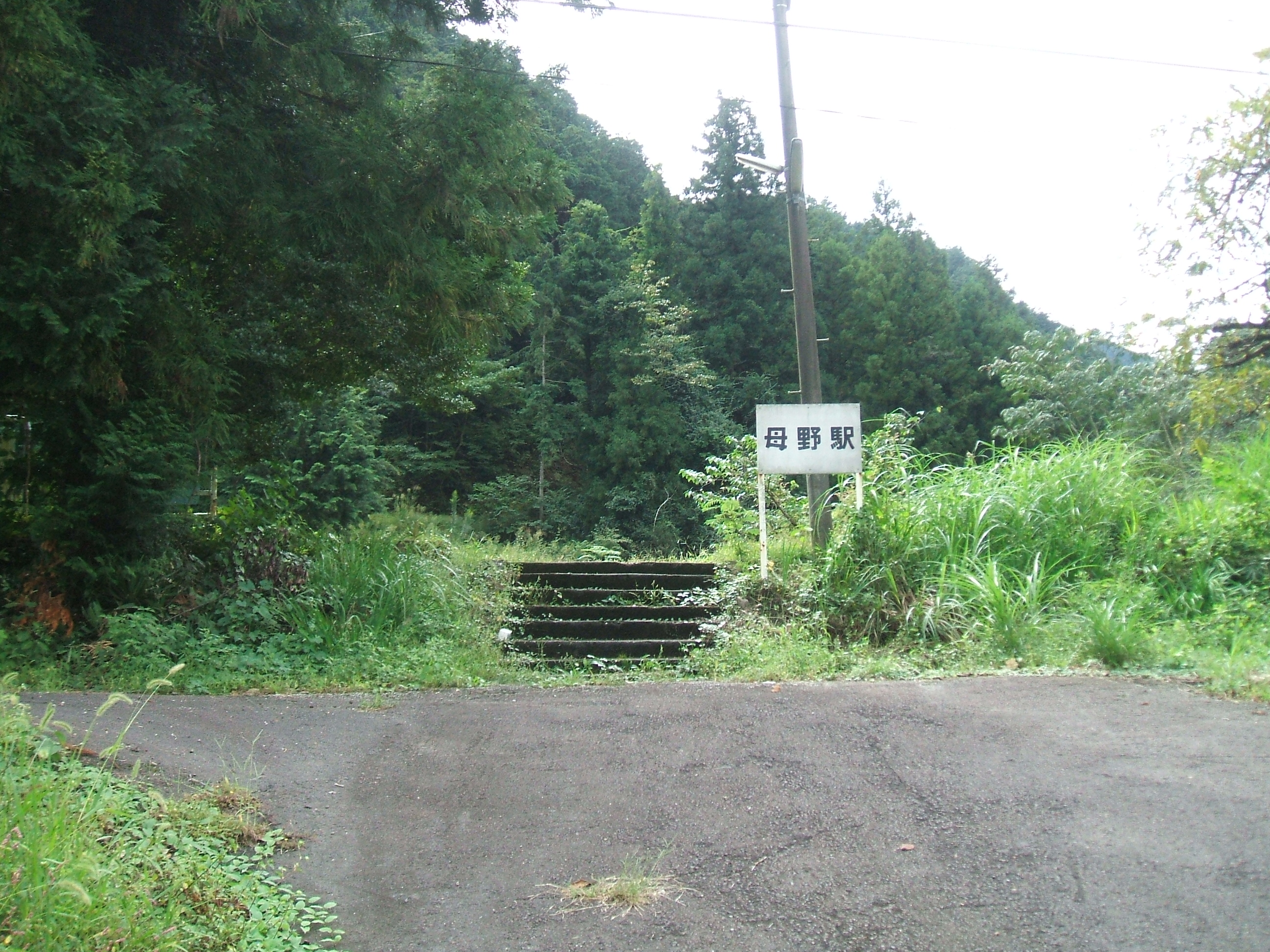 駅入り口。